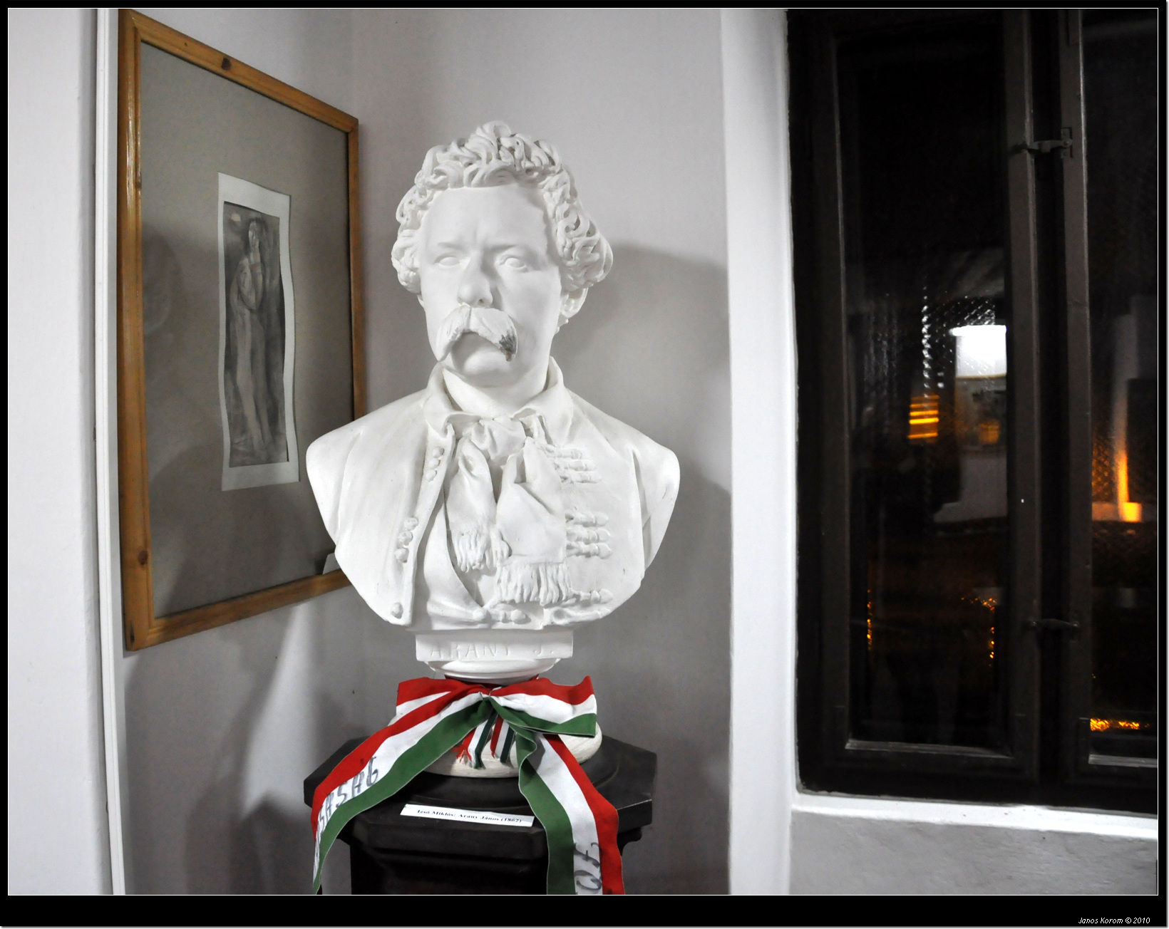 Nagyszalonta A Csonkatoronyban Arany János emlékmúzeum található.